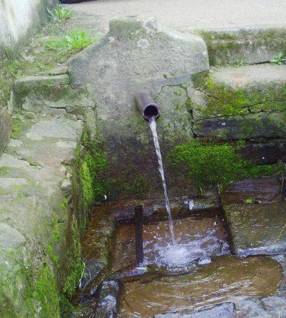 Nunca se ha secado